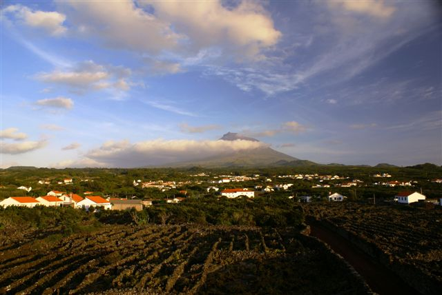 Currais de Vinha, paisagem protegida, ilha do Pico, Açores